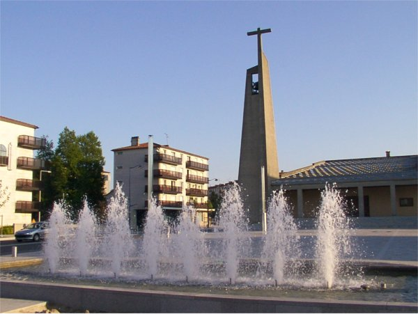 Vue de la façade de l'église Sainte-Bernadette de Tinqueux (France), place du marché angle des rues de la Liberté et du 29 août 1944.